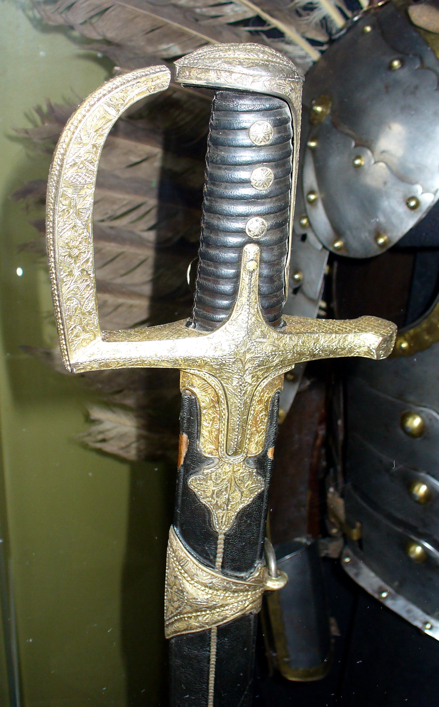 Сабля гусарская в ножнах (рукоять). Польша, 1614 год.